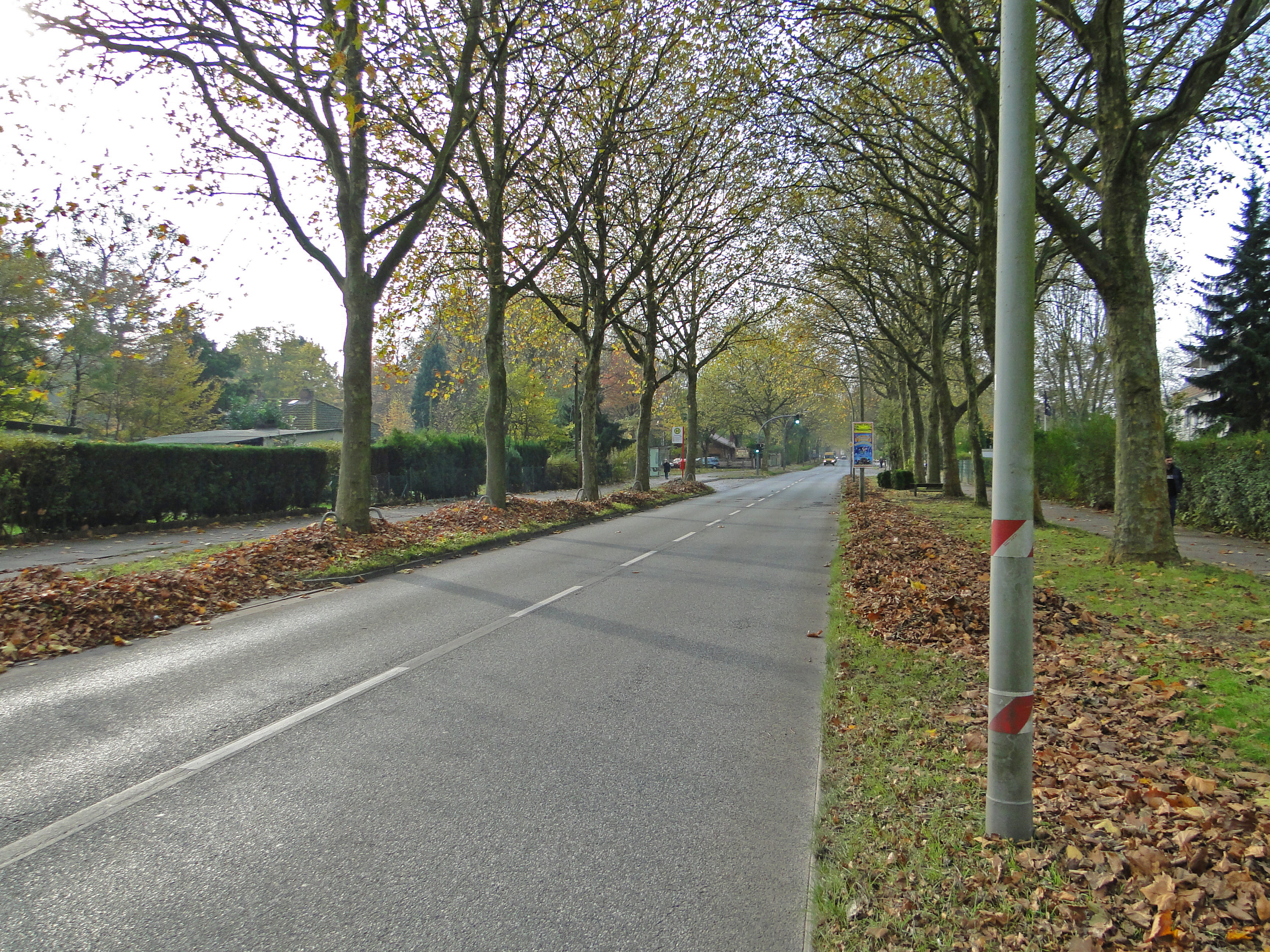 Manshardtstraße in Hamburg. Unter der Straße ist die U4 Verlängerung in die Horner Geest geplant. Auf dieser Höhe ist der U-Bahnhof Stoltenstraße vorgesehen